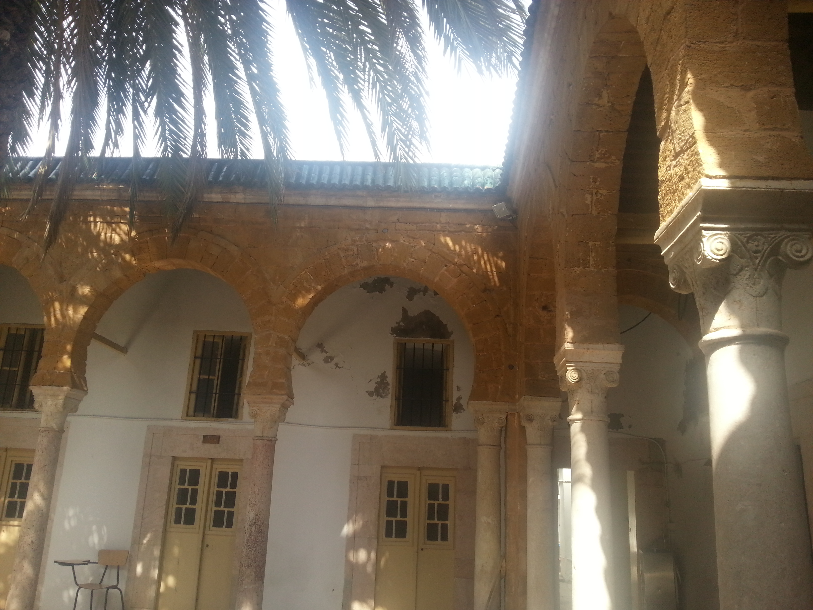 Medersa Ennakhla, Tunis